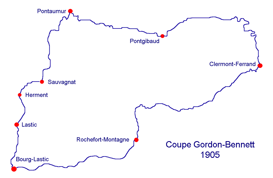 Circuit des monts d'Auvergne, parcours de la coupe Gordon-Bennett 1905